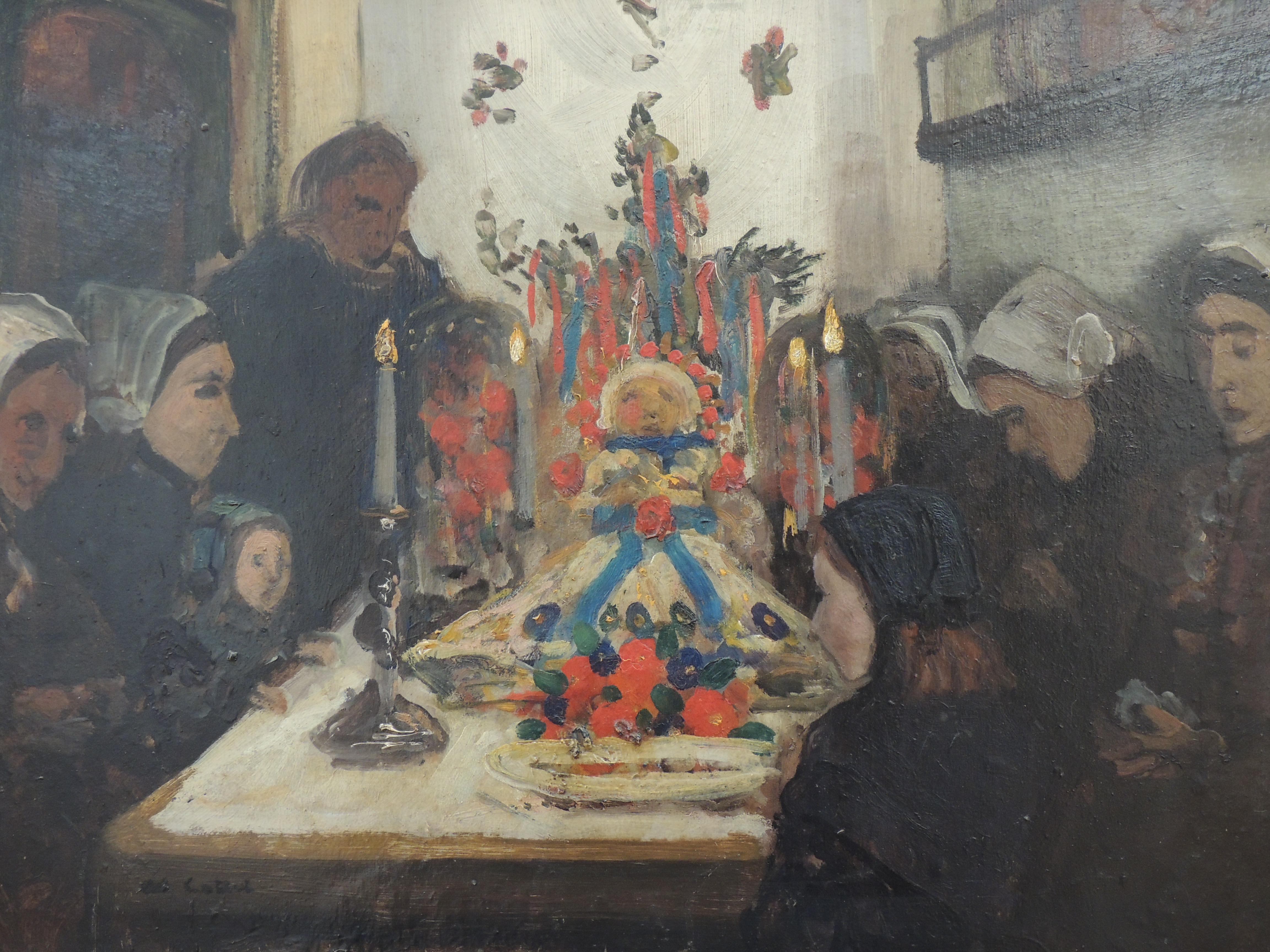 Charles Cottet, La veillée d'un enfant mort à Ouessant, huile sur carton